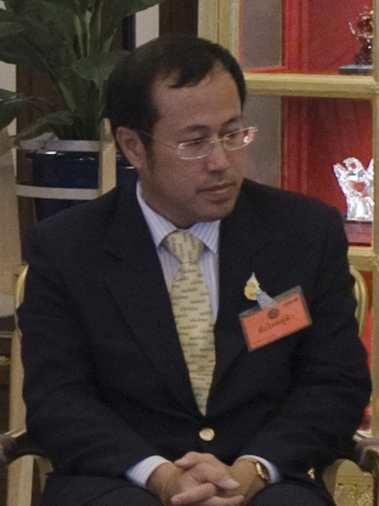 นายแพทย์ตุลย์ สิทธิสมวงศ์ นำกลุ่มผู้ค้าตลาดนัดจตุจักรเข้าเยี่ยมคารวะและยื่นหนังสือร้องเรียนปัญหากับนายกรัฐมนตรี ห้องสีม่วง ตึกไทยคู่ฟ้า ทำเนียบรัฐบาล วันศุกร์ ที่ 3 กันยายน พ.ศ.2553 (Photographer attached to the Prime Minister of the Kingdom of Thailand : Peerapat Wimolrungkarat / พีรพัฒน์ วิมลรังครัตน์)